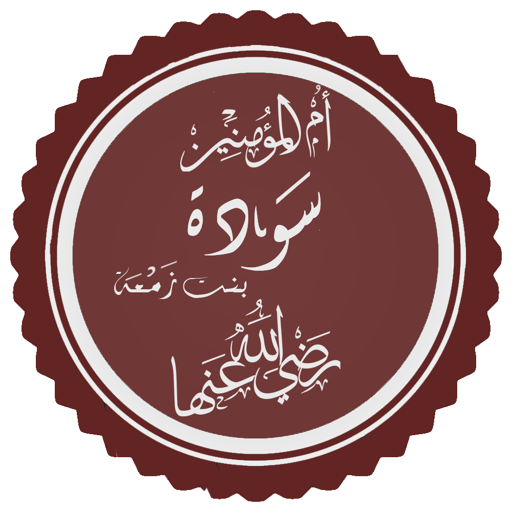 تخطيط اسم سودة بنت زمعة أم المؤمنين رضي الله عنها